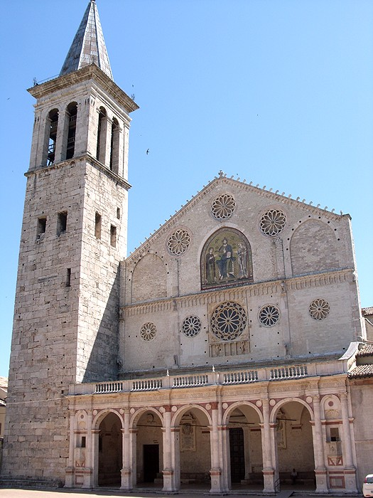 Spoleto - Duomo